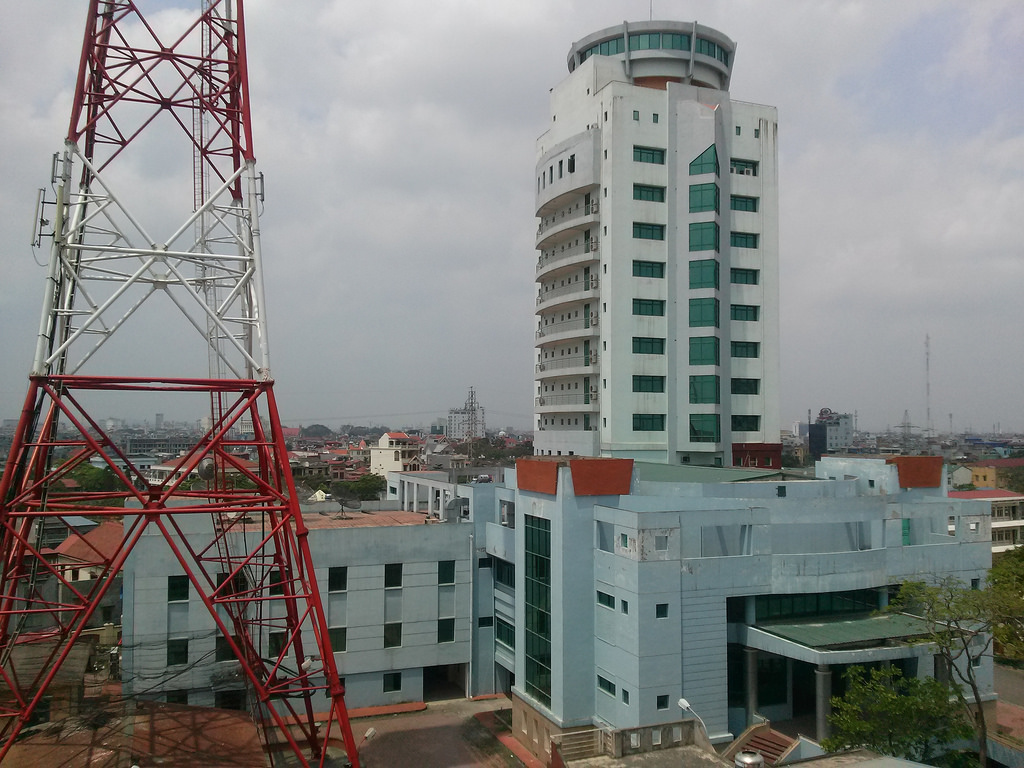 Trung tâm PTTH Hải Phòng